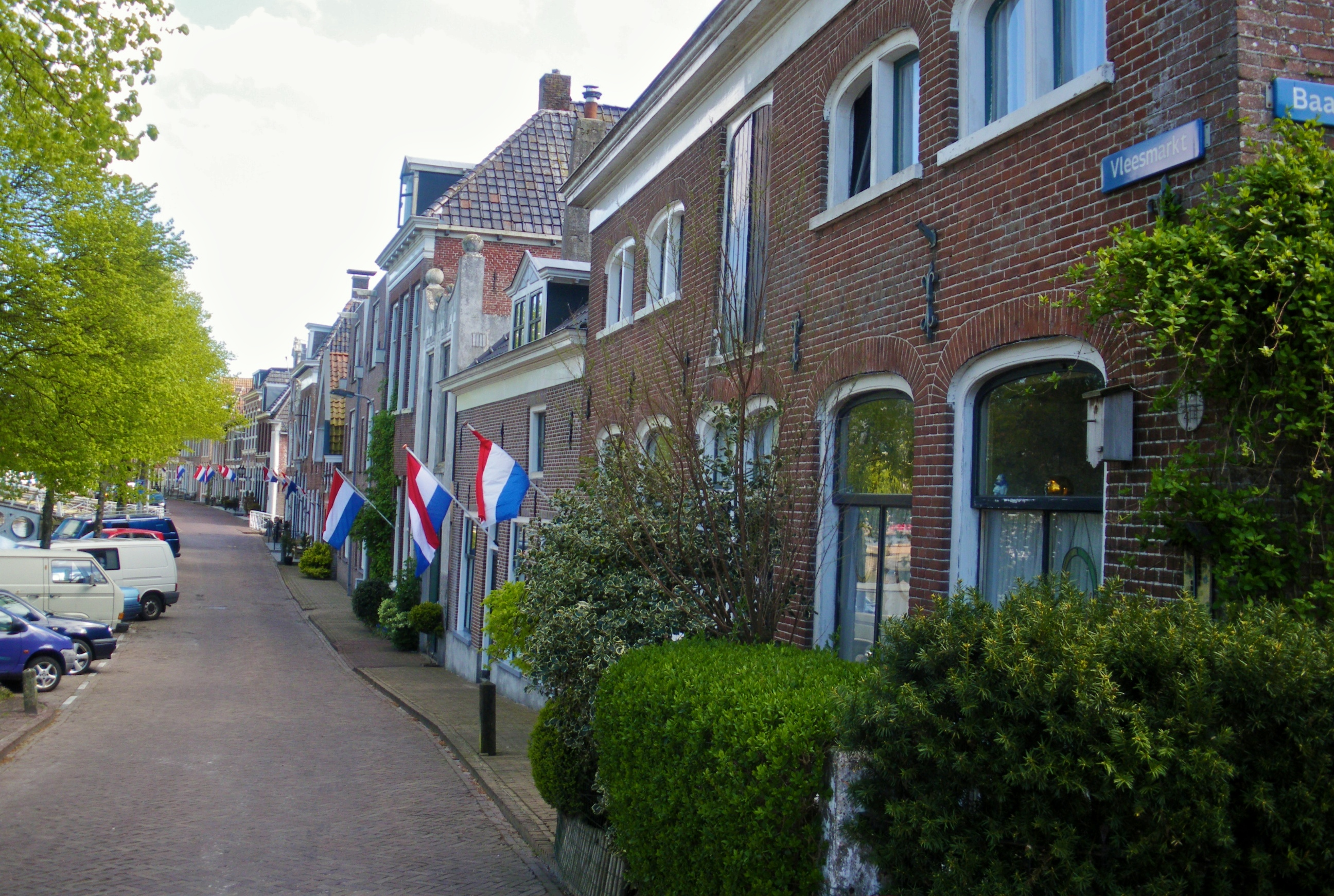 De Vleesmarkt in Dokkum op Bevrijdingsdag.